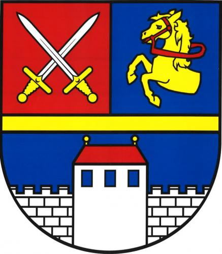 znak, Kámen, okres Pelhřimov